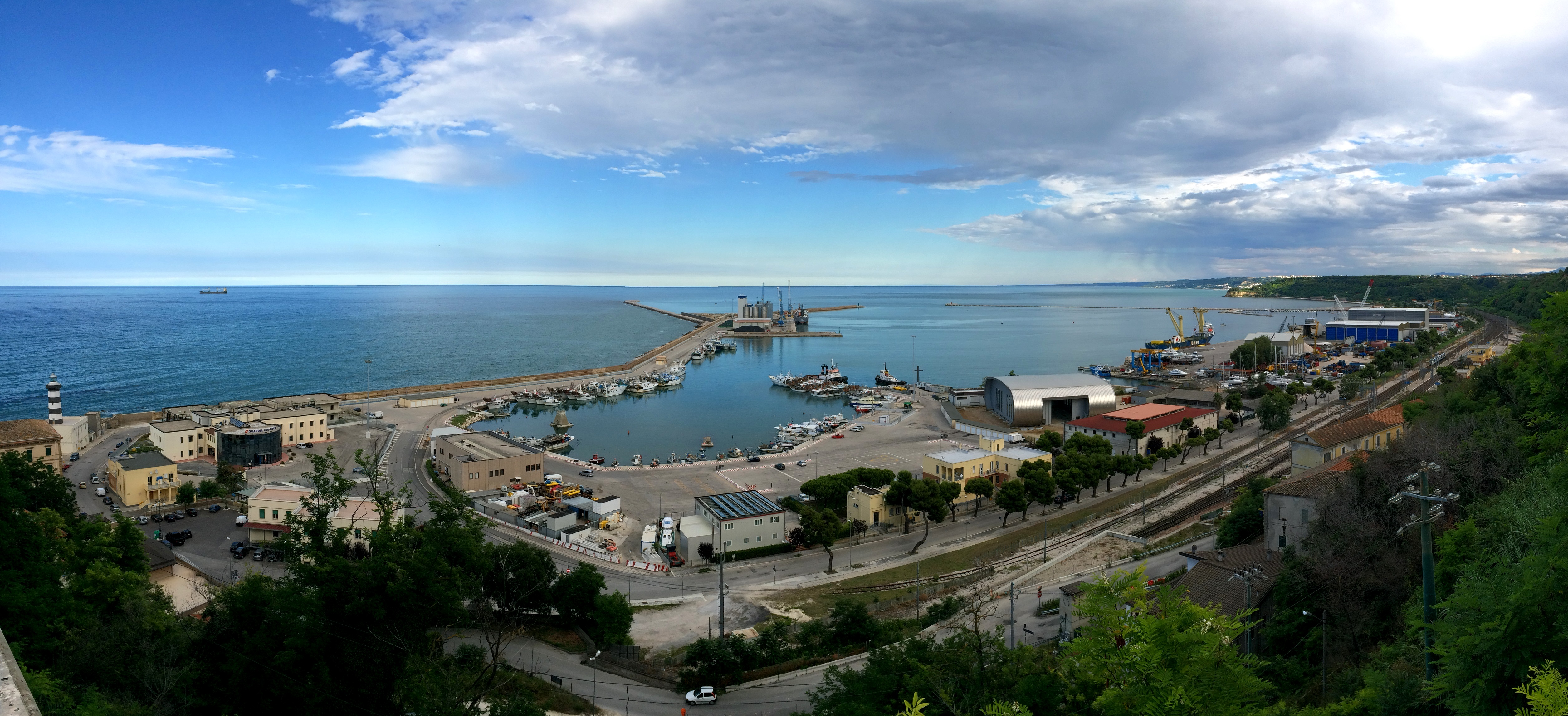 Veduta da Ortona (CH) dell'omonimo porto.